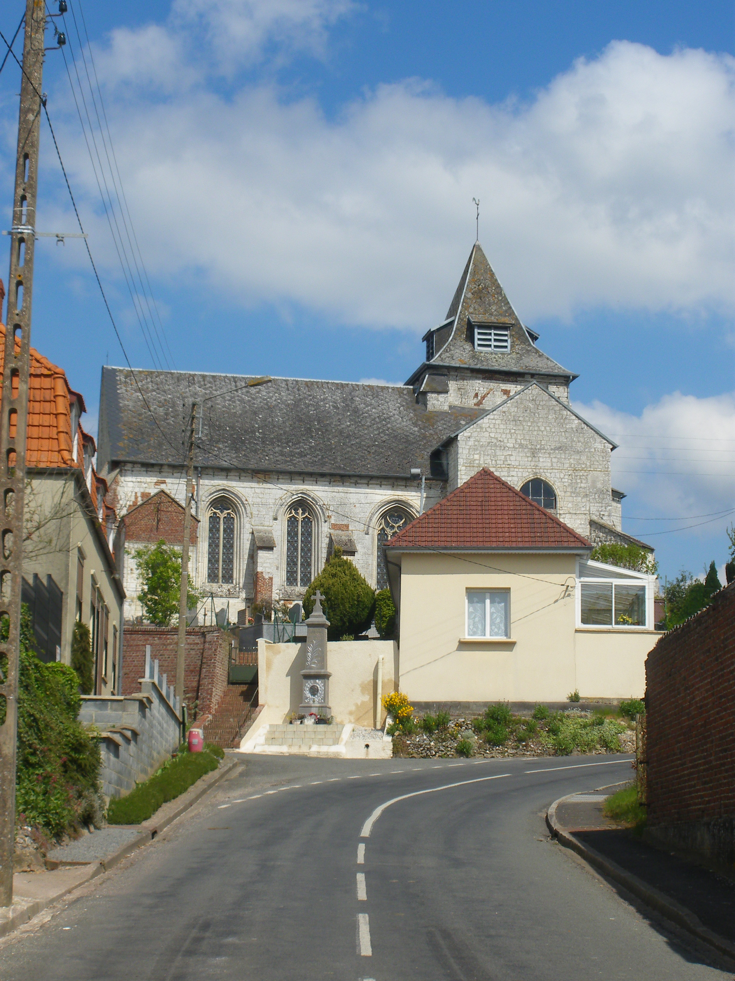 Vue de l'église Saint-Modeste et du monument aux morts de Ligny-sur-Canche.